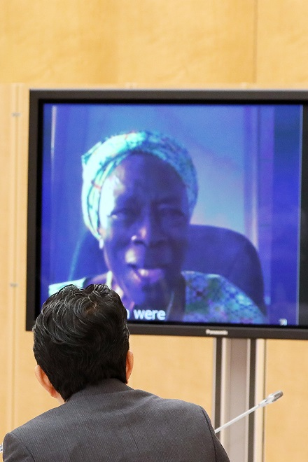 ミリアム・ウェレ（野口英世アフリカ賞の運営の改善に向けた有識者懇談会にて）